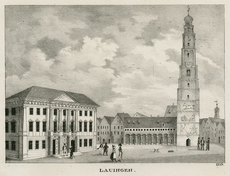 Lauingen, Rathaus mit Wappen des Kurfürsten Carl Theodor von Bayern. Kreidelithographie von Johann Baptist Dilger, um 1840. Darstellung : 14 × 19,5 cm